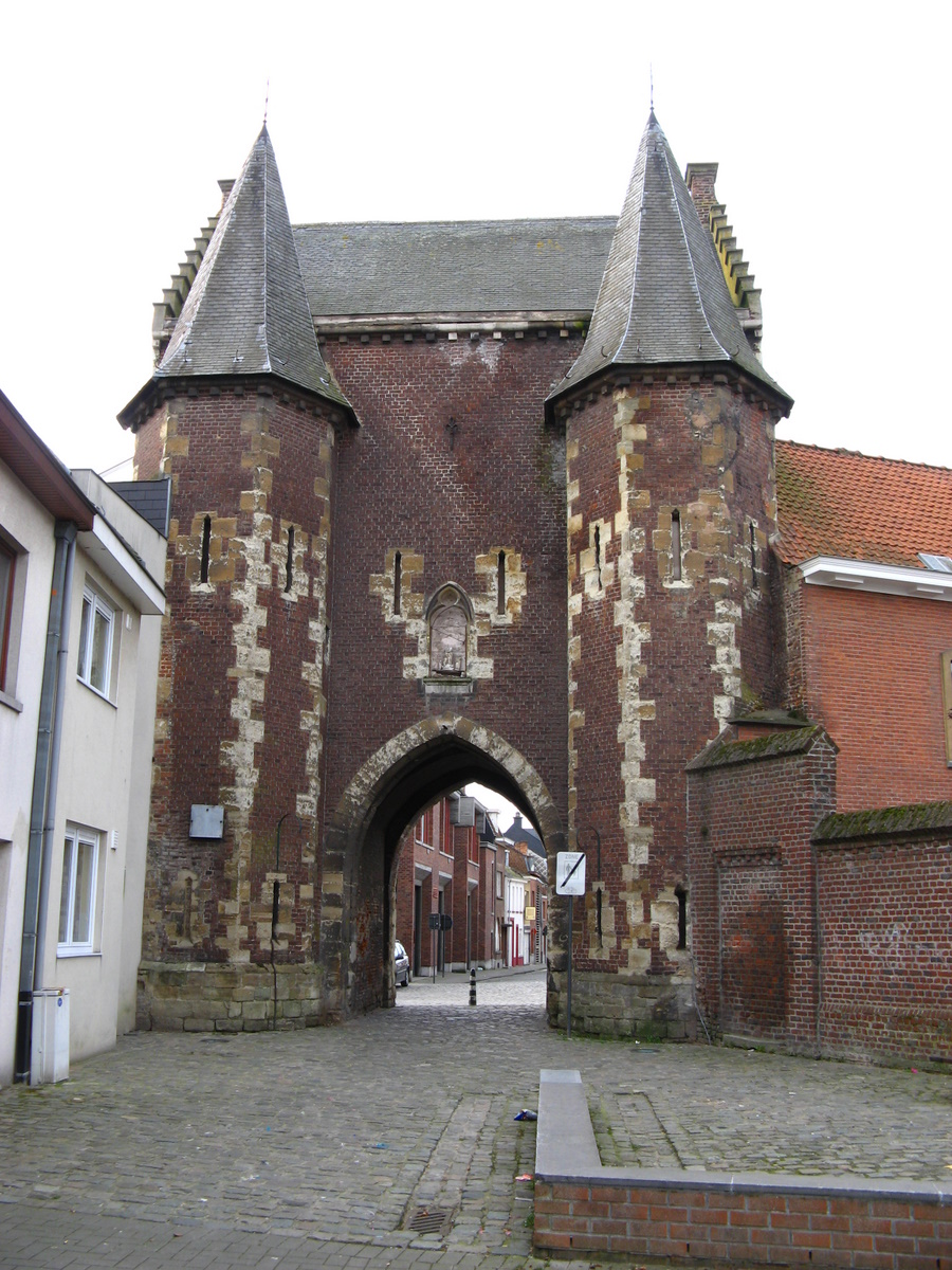 Koepoort,backside, ninove, belgium